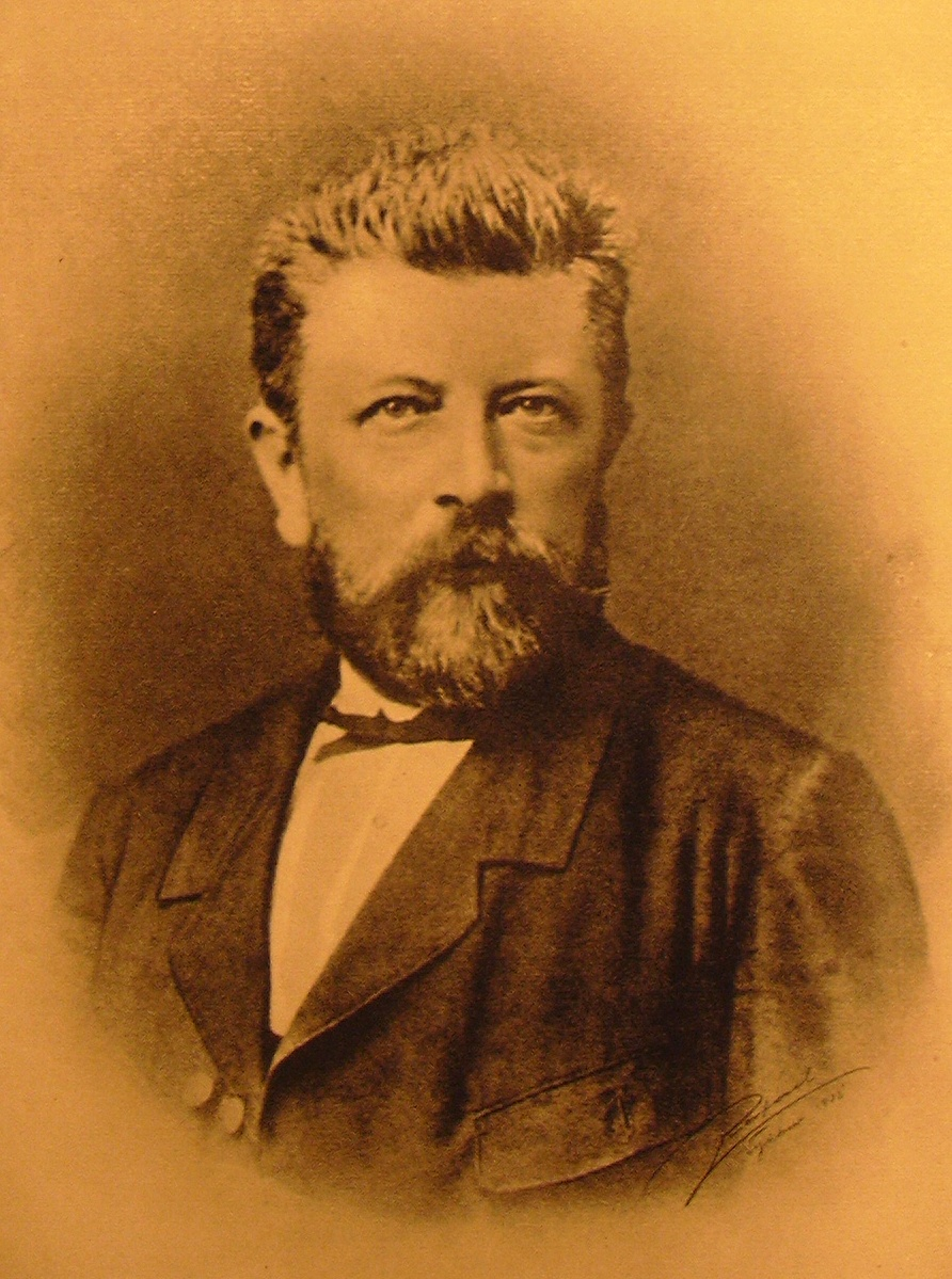 Dr. Josef Svoboda Starosta města Vyškov 1893 - 1903